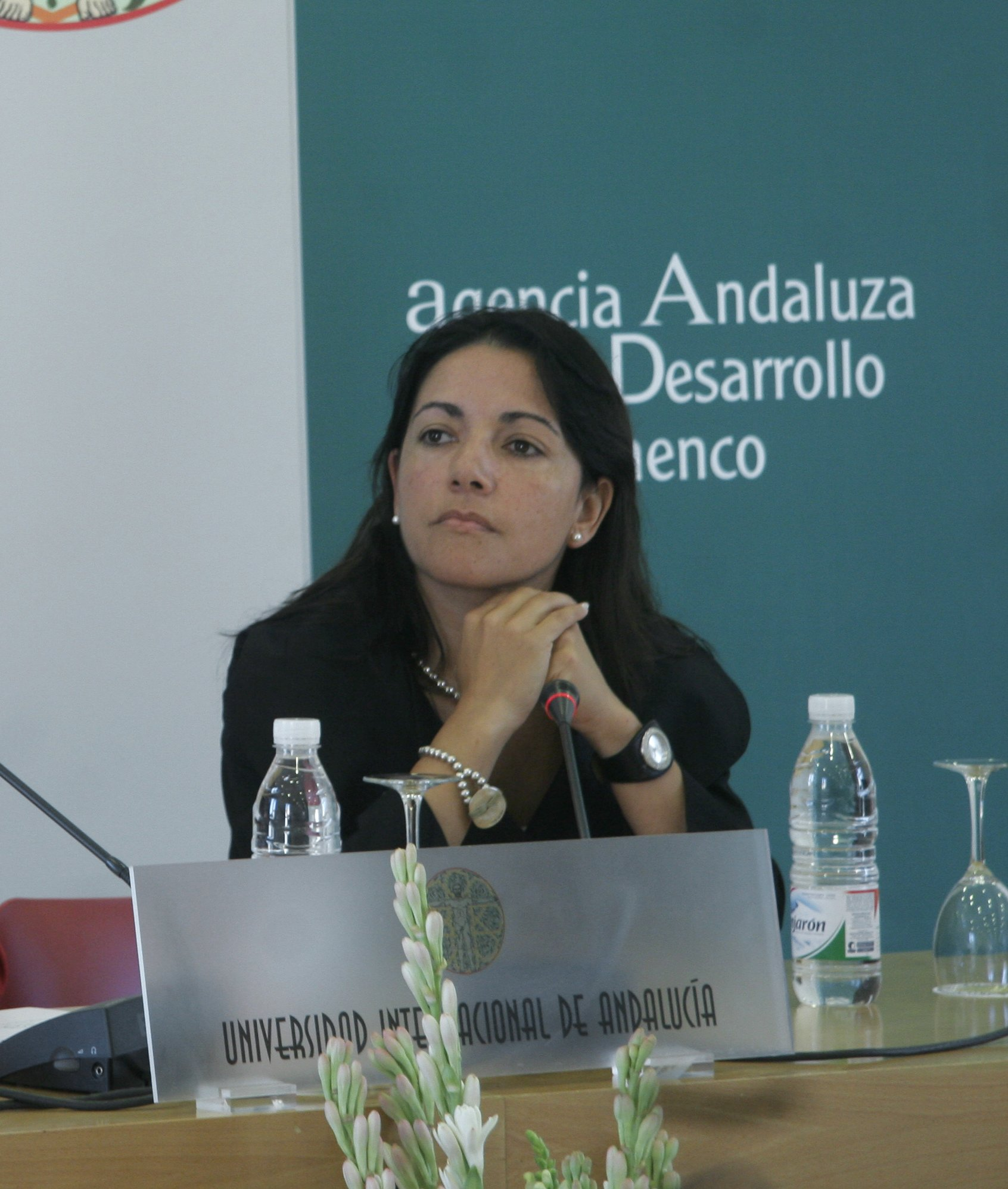 La bailaora flamenca Eva la Yerbabuena en el curso Por"Los flamencos hablan de sí mismos II" (Cursos de Verano 2007 de la Universidad Internacional de Andalucía).